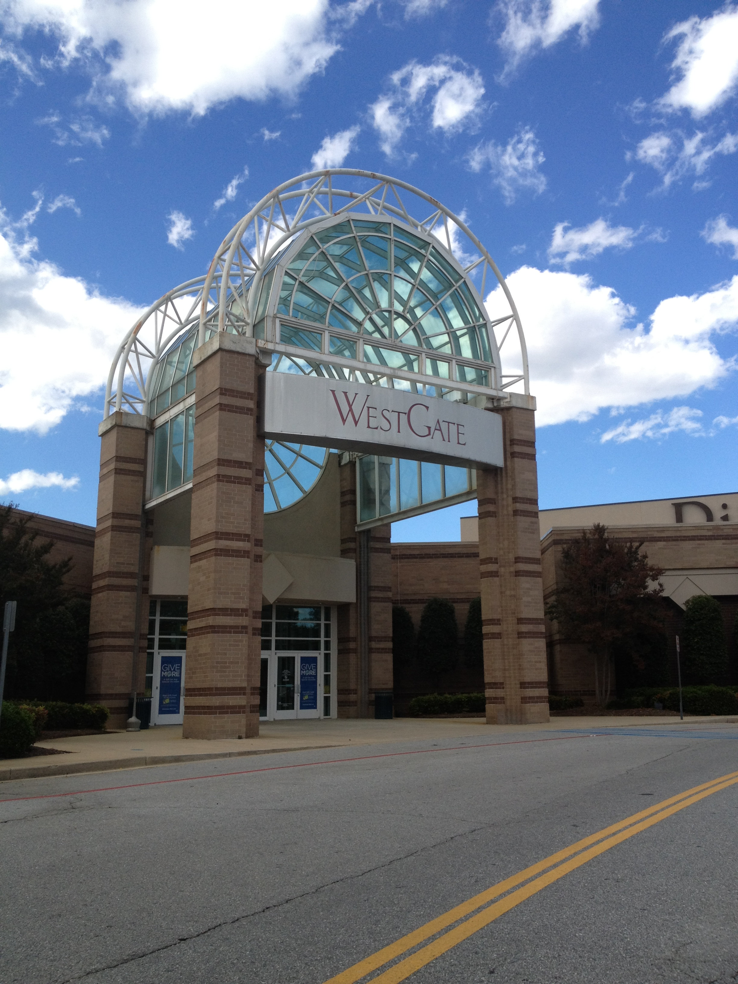 Westgate Mall